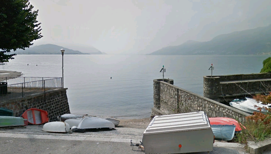 Vista sul lago Maggiore sulla Main Street